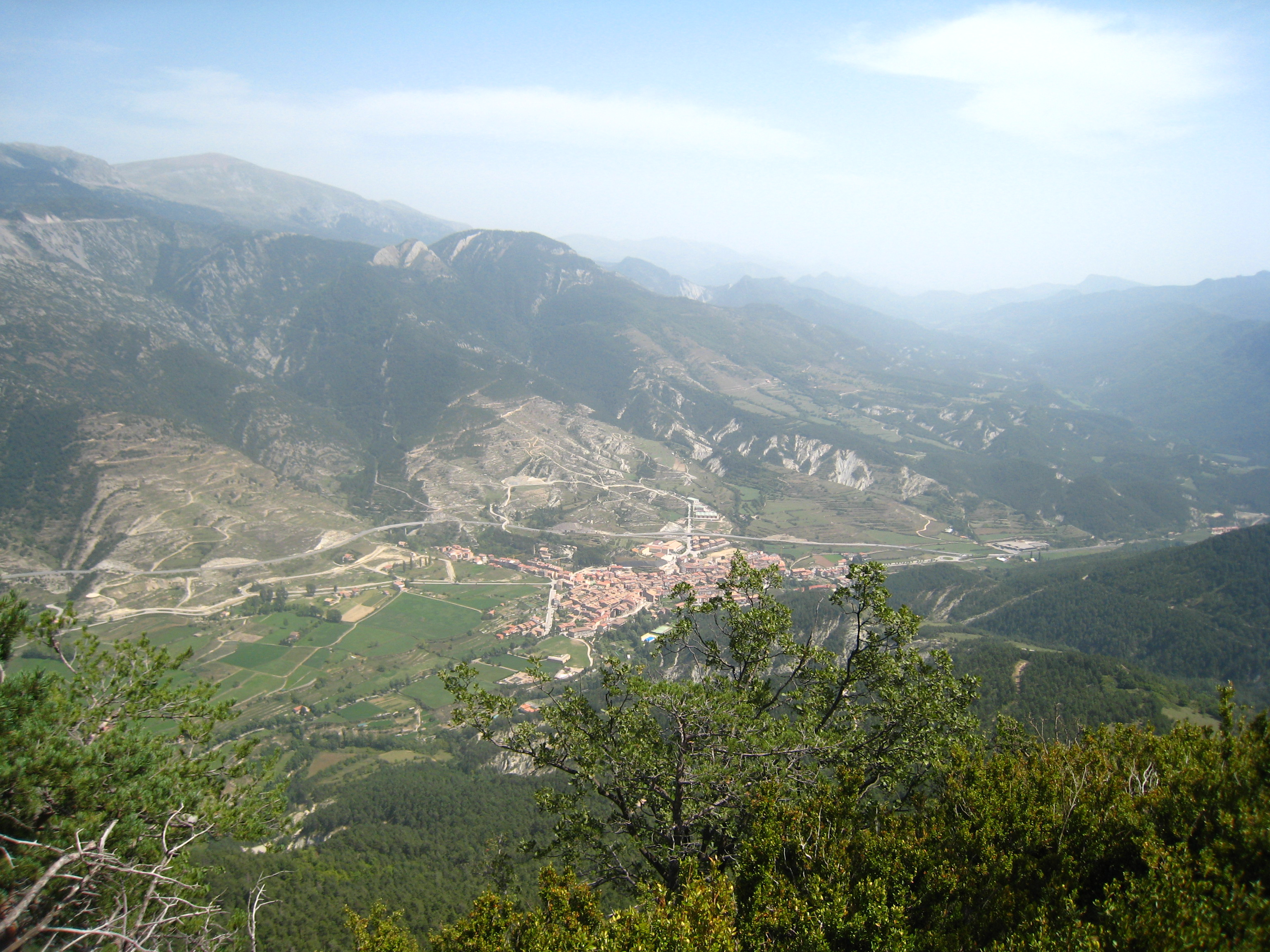 Baga des de la Roca Tirabal